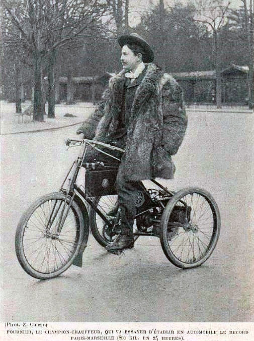 Henri Fournier, dans La Vie au Grand Air du 15 avril 1898Fournier, le champion-chauffeur, qui va essayer d'établir en automobile le record Paris-Marseille (800 kil. en 24 heures)